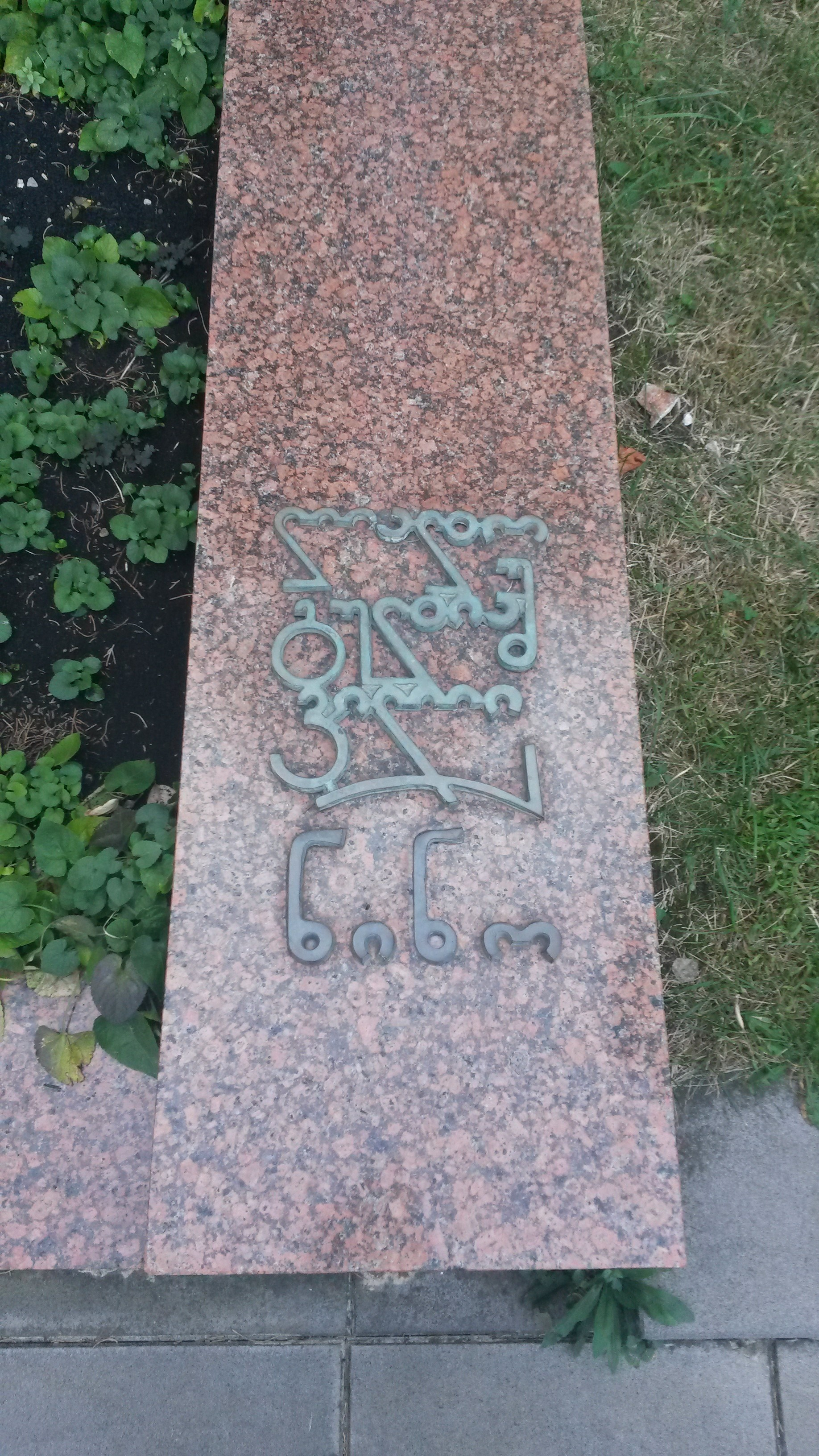 მთაწმინდის პანთეონი